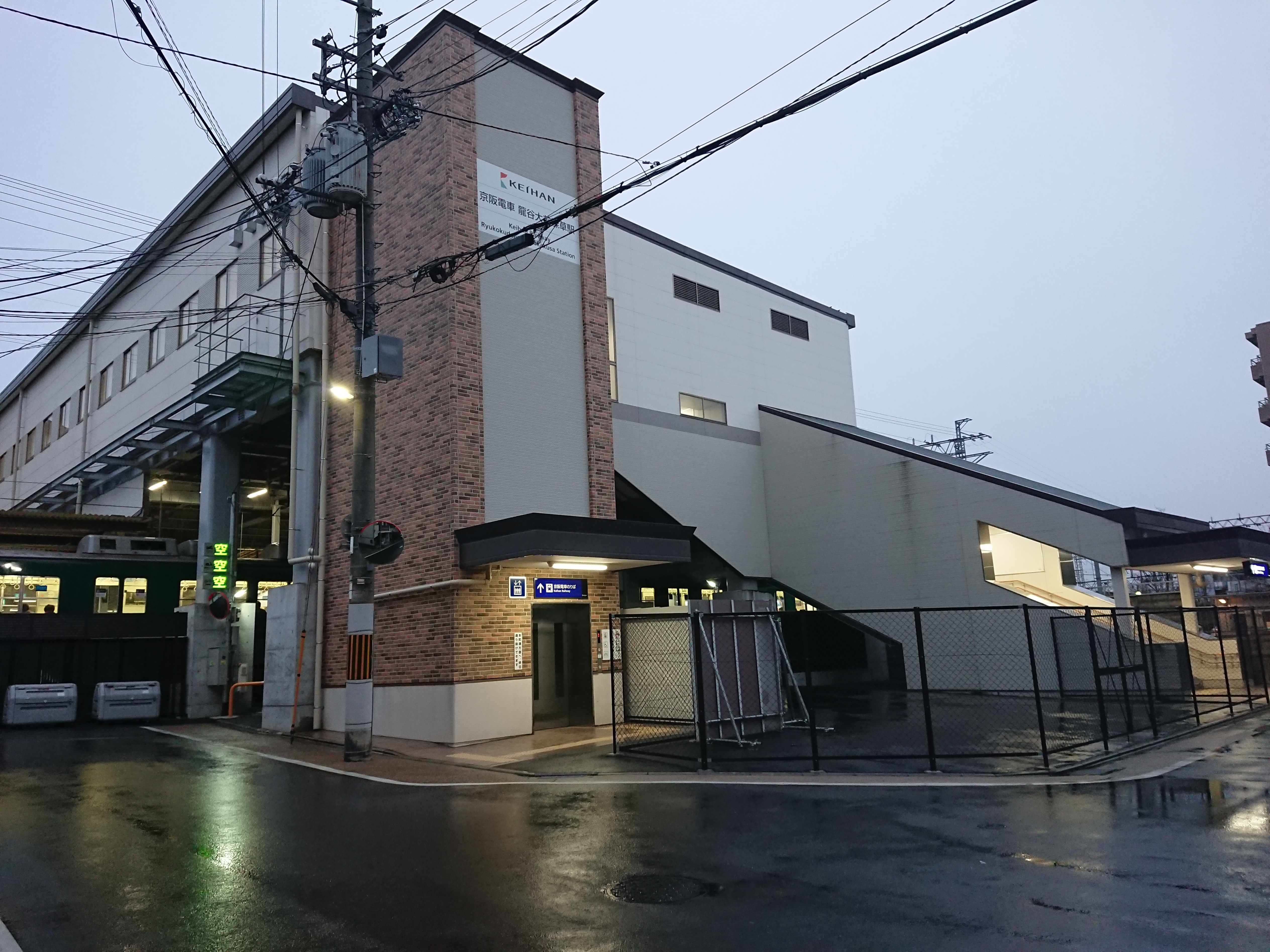 京阪本線 龍谷大前深草駅 西側駅舎（京都市伏見区）